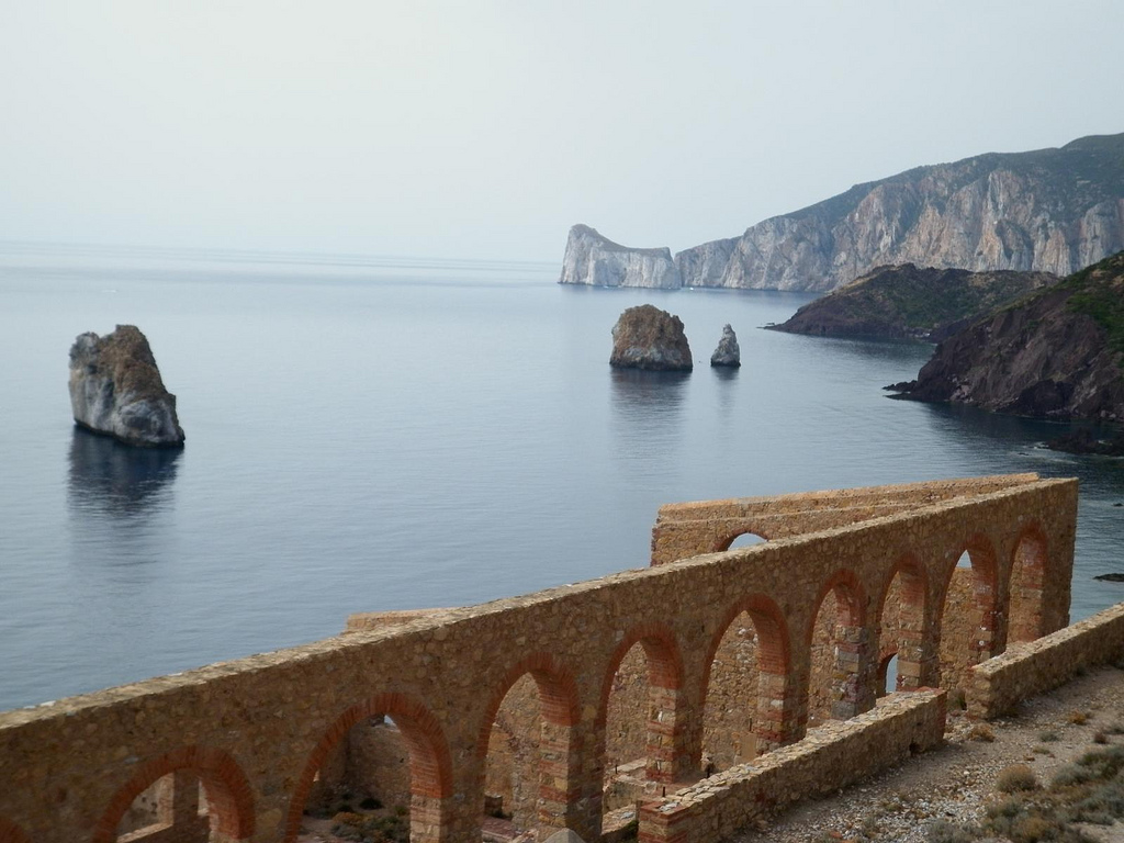 Masua : in primo piano i ruderi della laveria La Marmora sullo sfondo il Pan di Zucchero